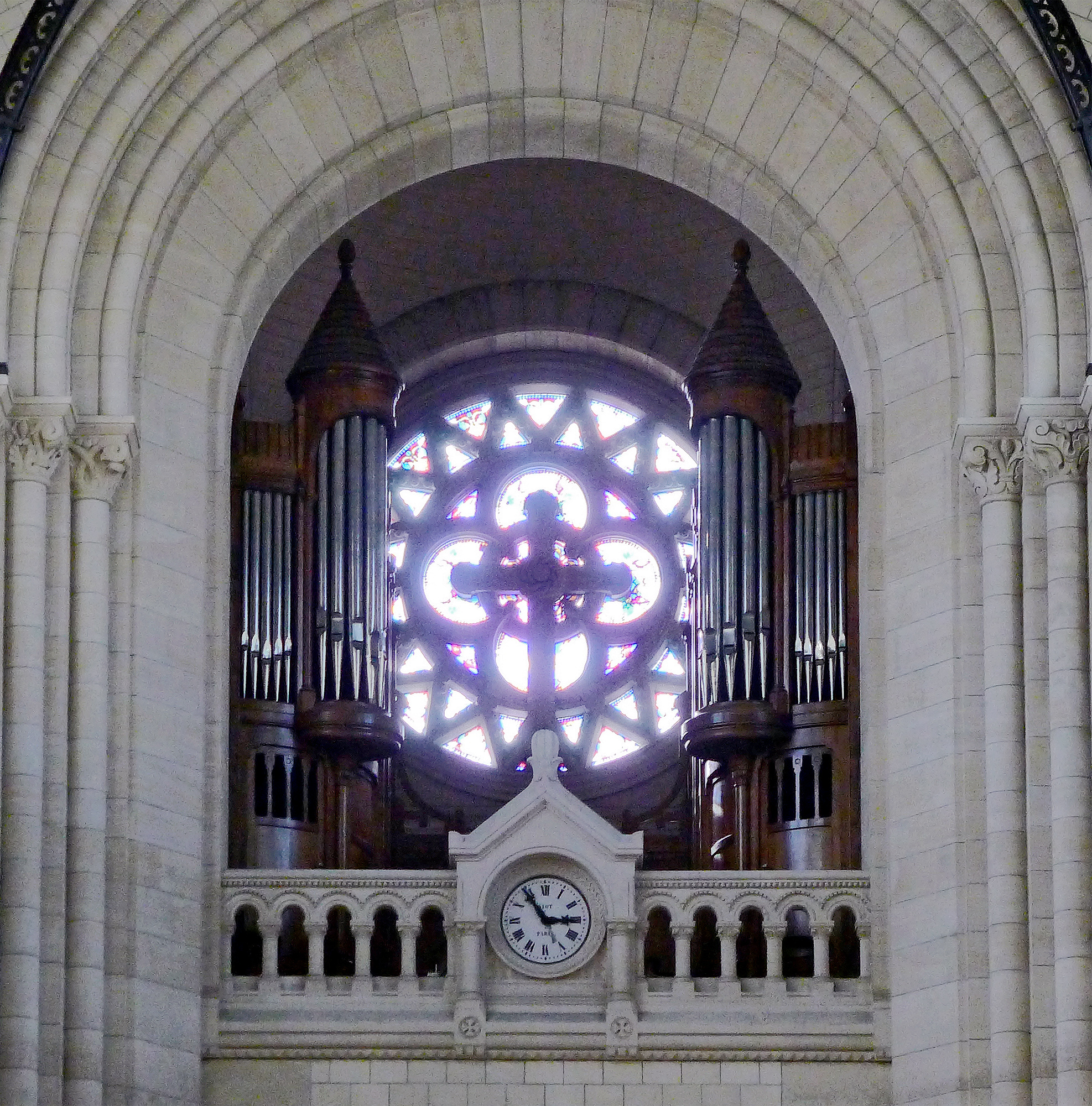 Église Notre-Dame-de-la-Croix de Ménilmontant (orgue) - Paris XX